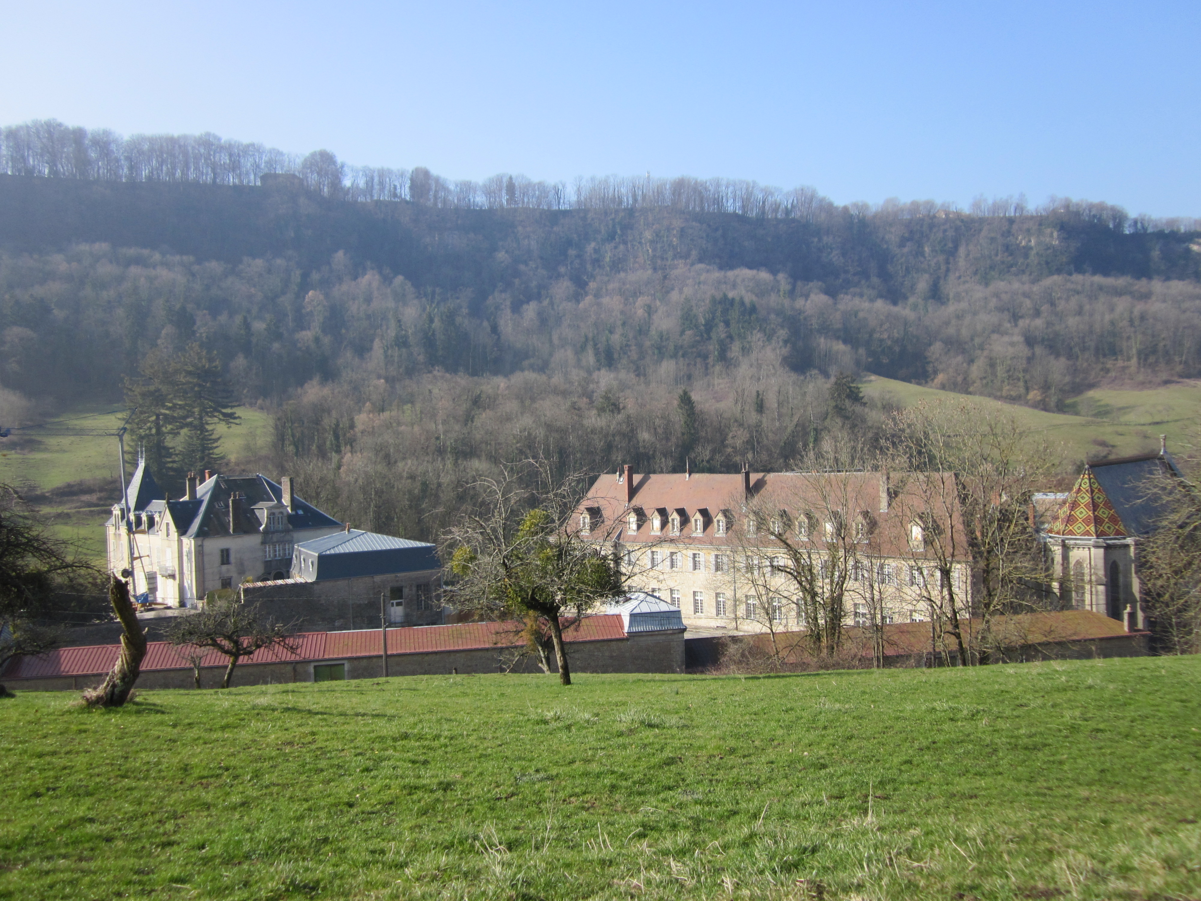 Vaux-sur-Poligny - Bâtiments actuels à l'emplacement de l'ancien prieuré : château (fin XIXe s.), église à tuiles vernissées, ancien séminaire.